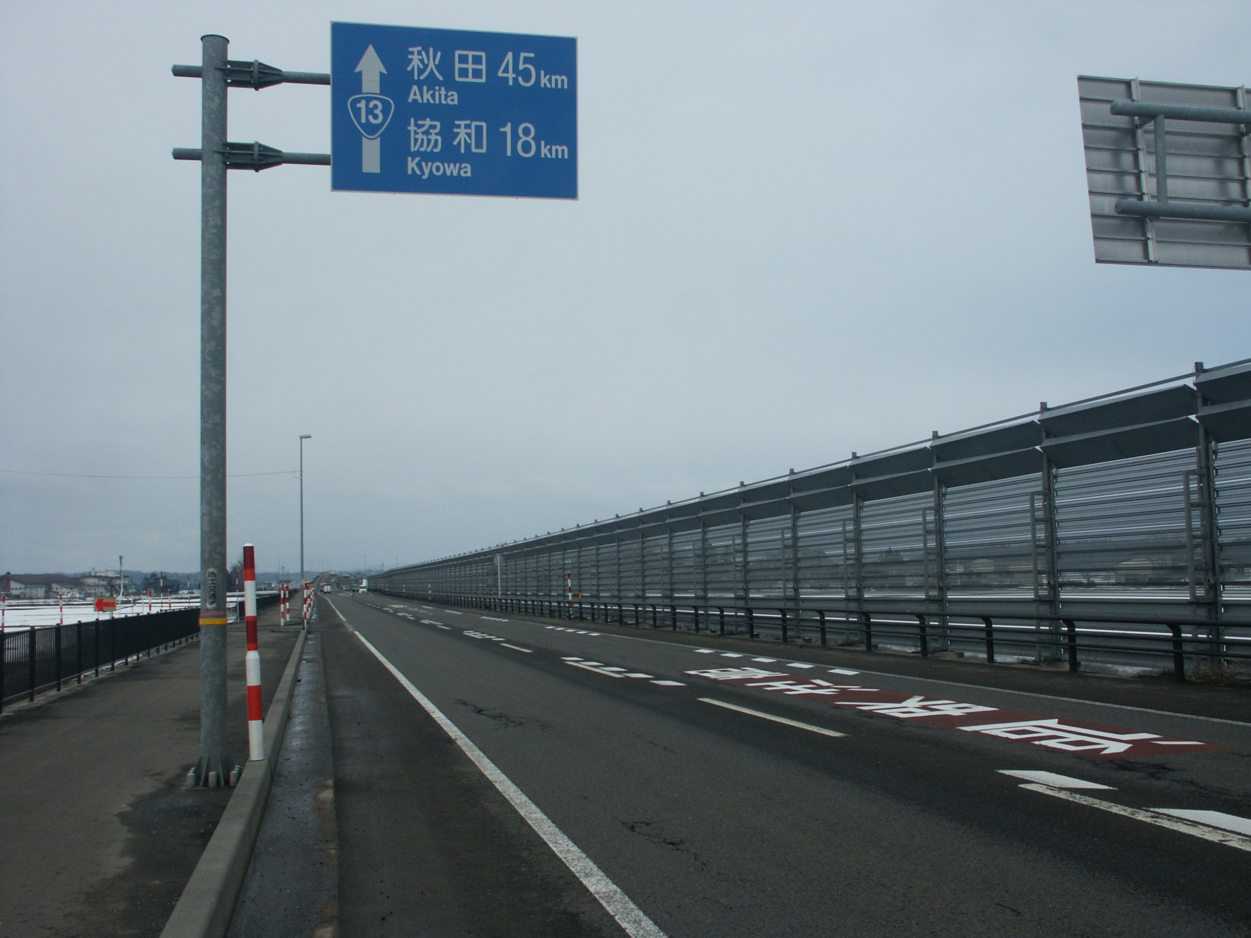 国道13号線神宮寺バイパス秋田県大仙市神宮寺付近